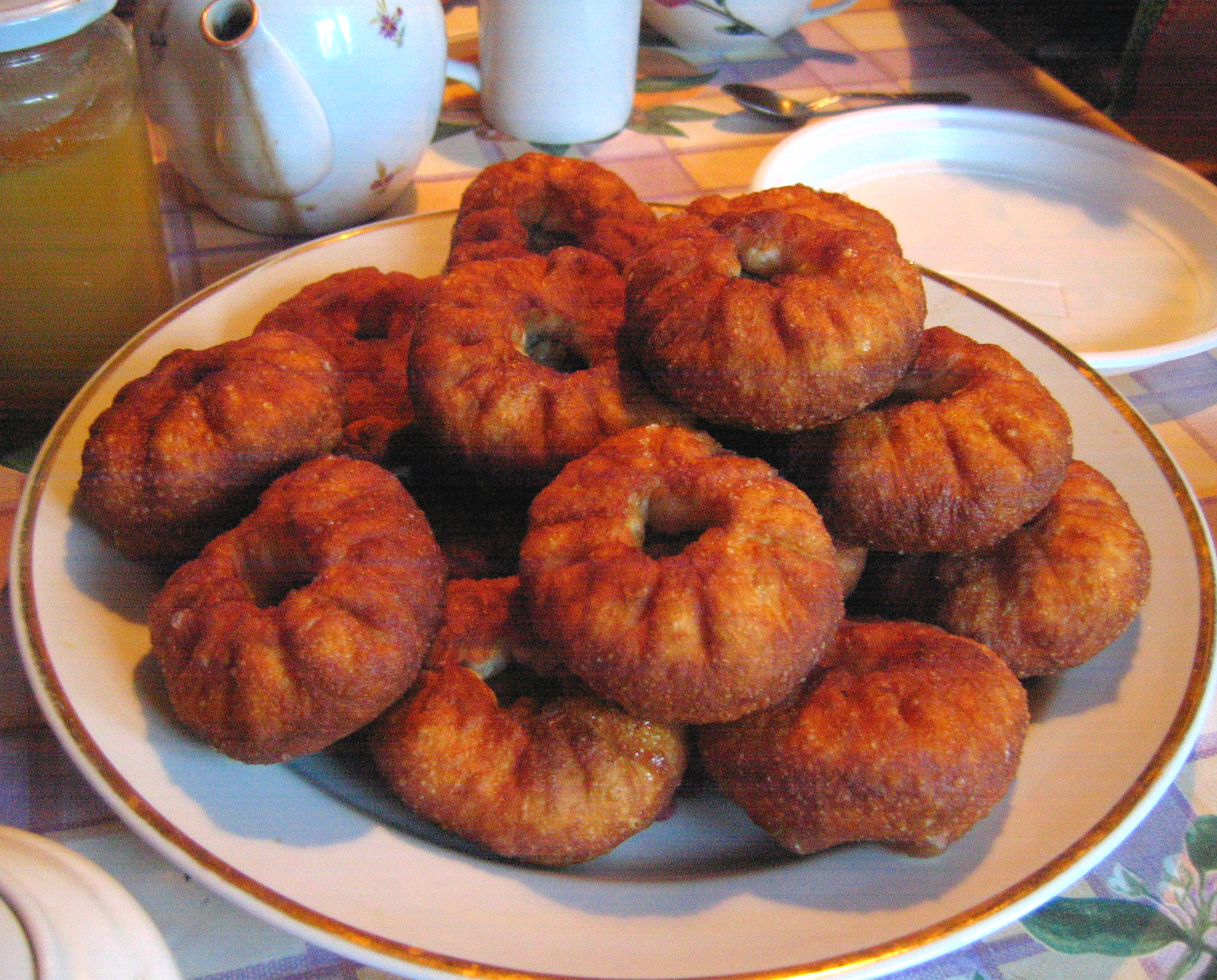 belyash